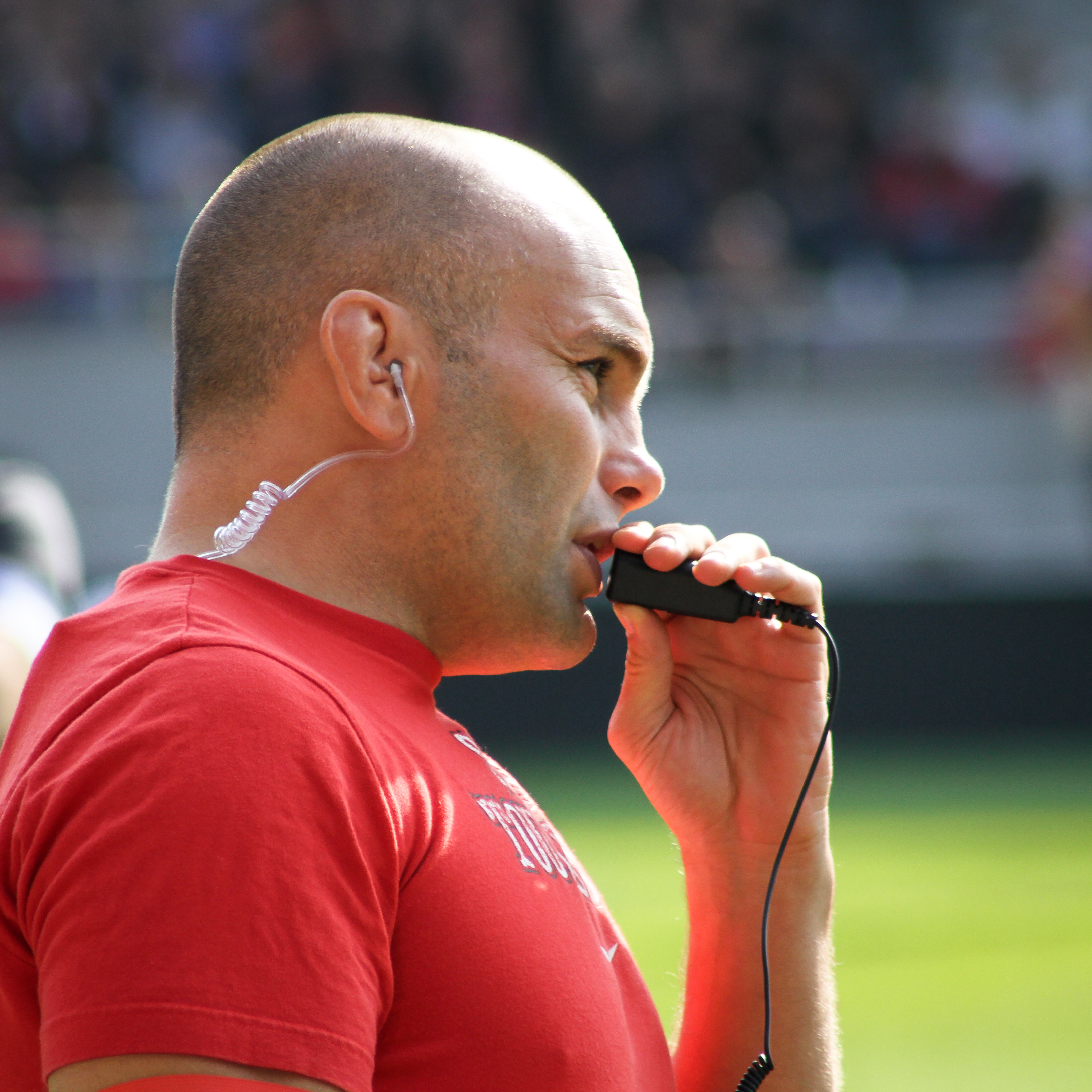 Yannick Bru, lors du match du top 14 2010 Stade Toulousain / Perpignan